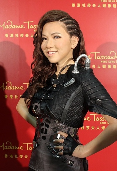 X.X.X.Live 2015 Hong Kong 後台蠟像展出 香港杜莎夫人蠟像館 鄧紫棋